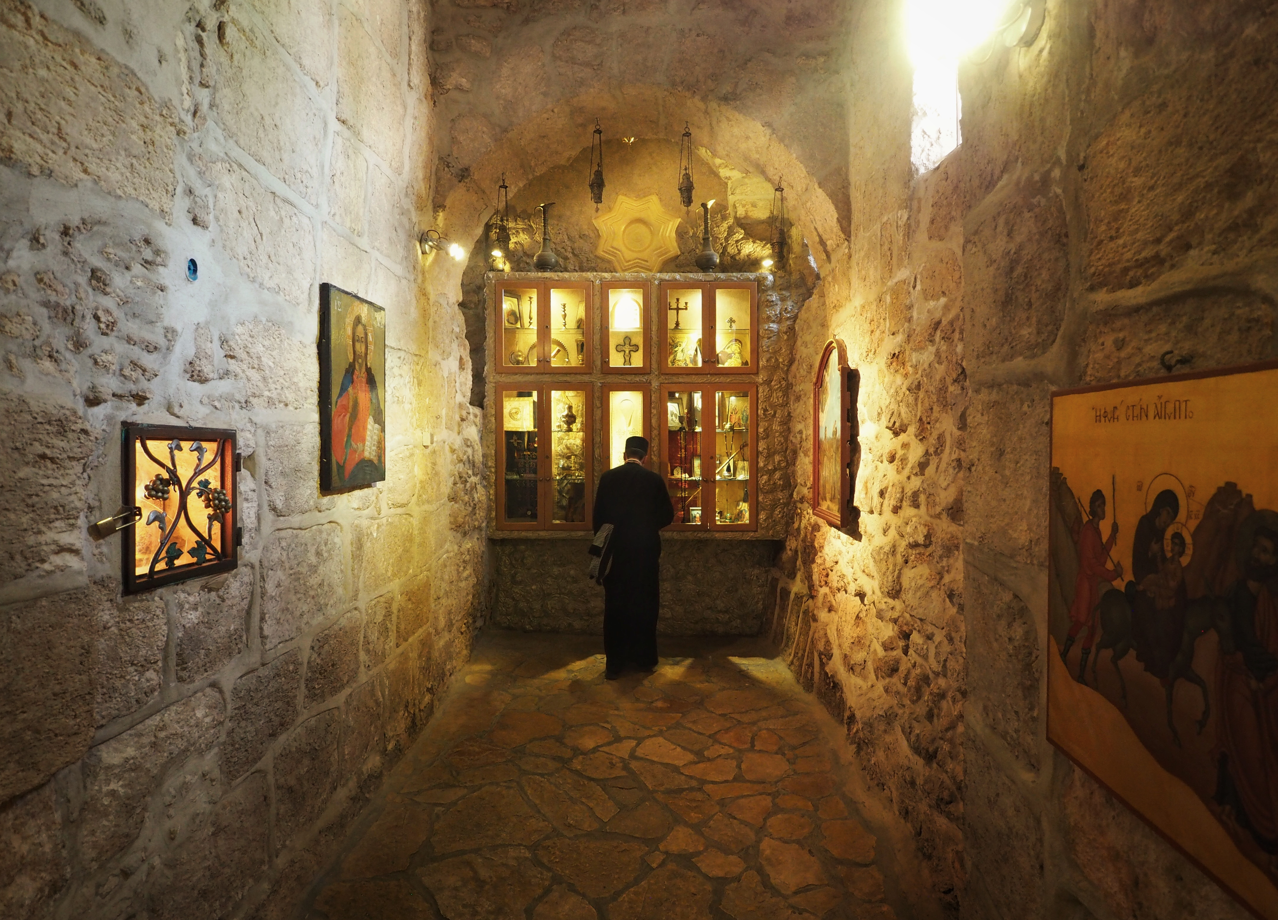 Bethlehem, Palestine